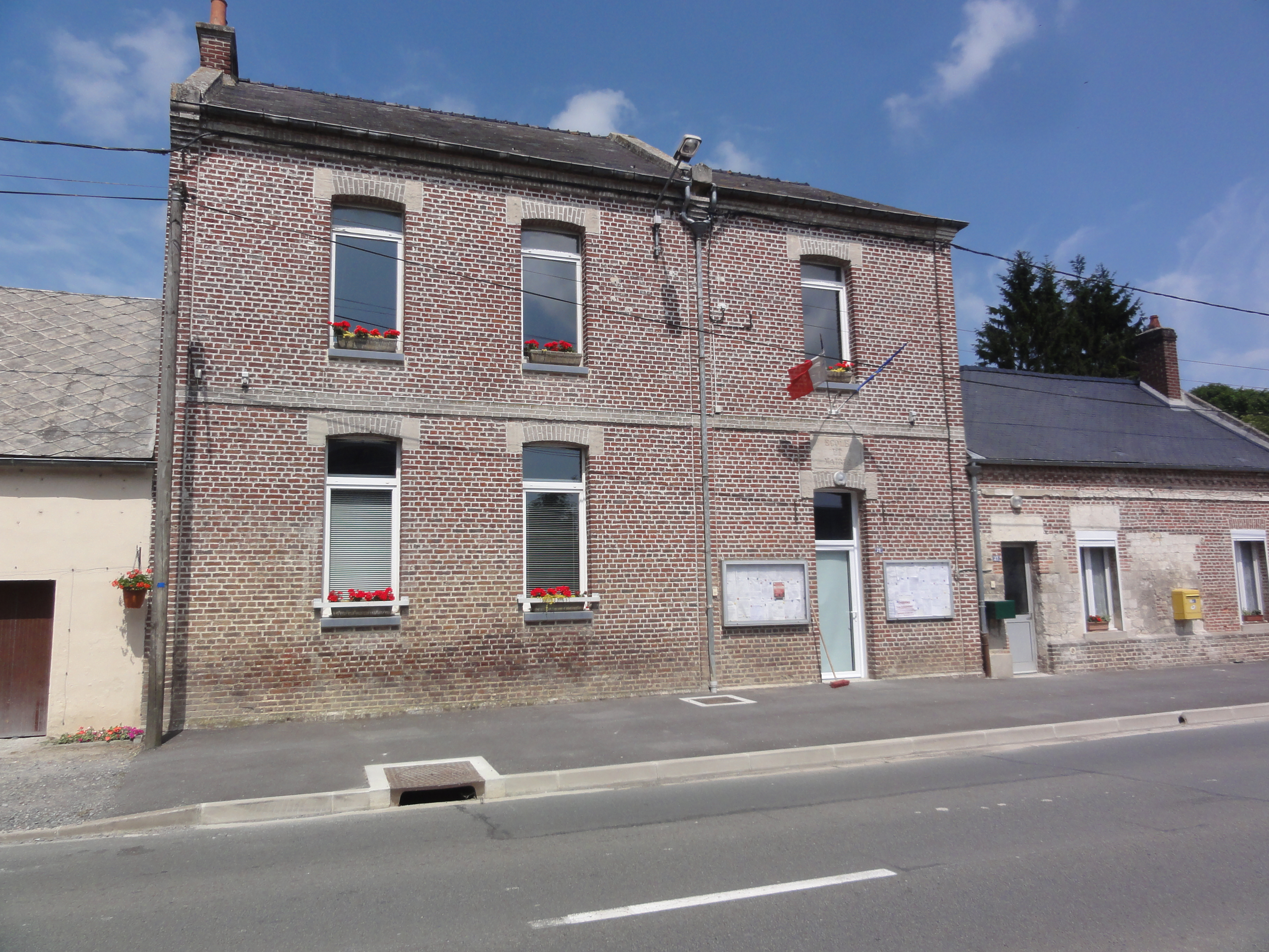 Thiernu (Aisne) mairie